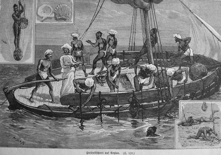 Perlenfischerei auf Ceylon. Holzstich von 1889